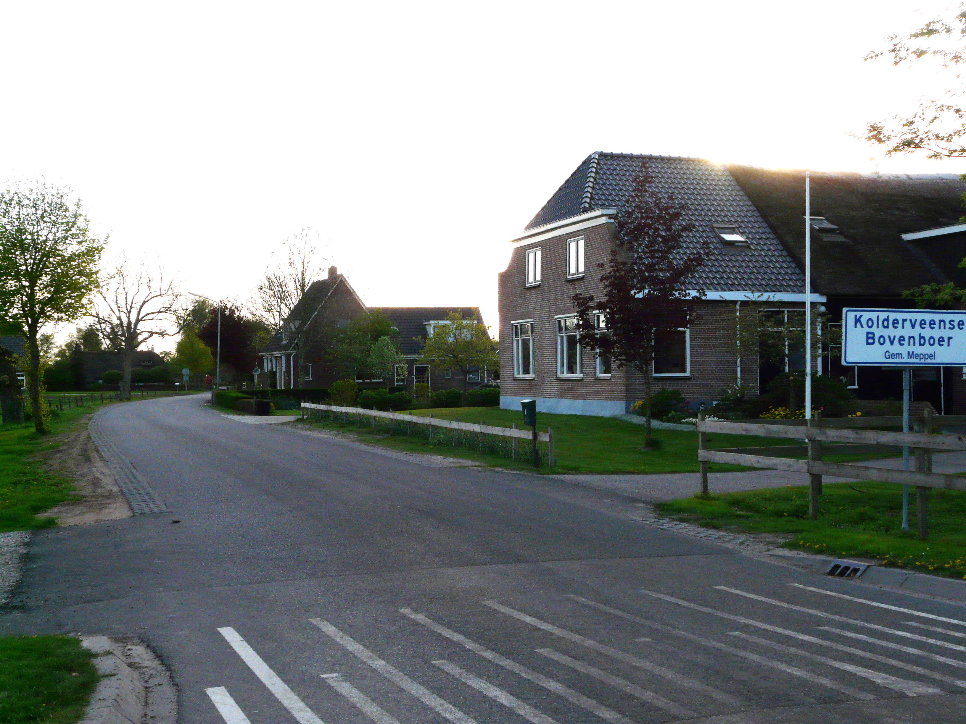 Nijeveen